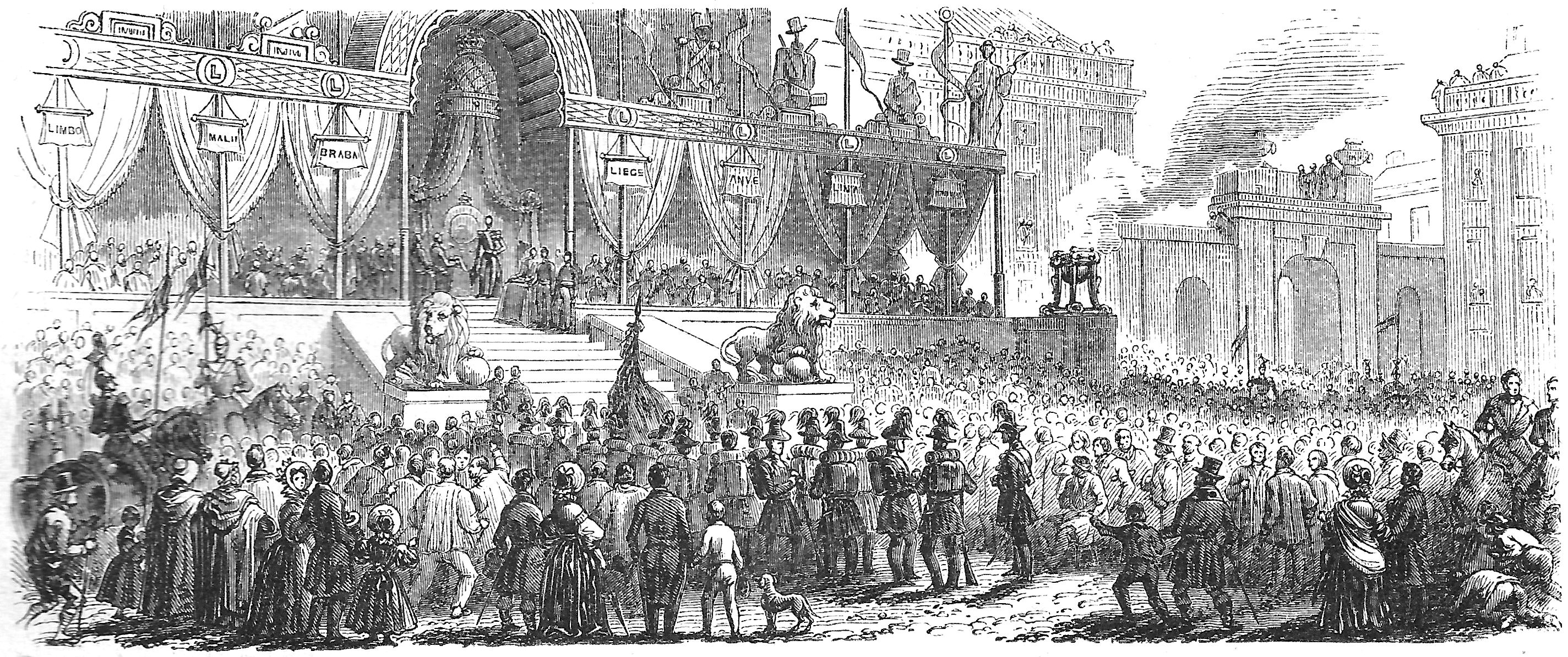 Prestation de serment de Léopold Ier, Place royale (Bruxelles), le 21 juillet 1831.